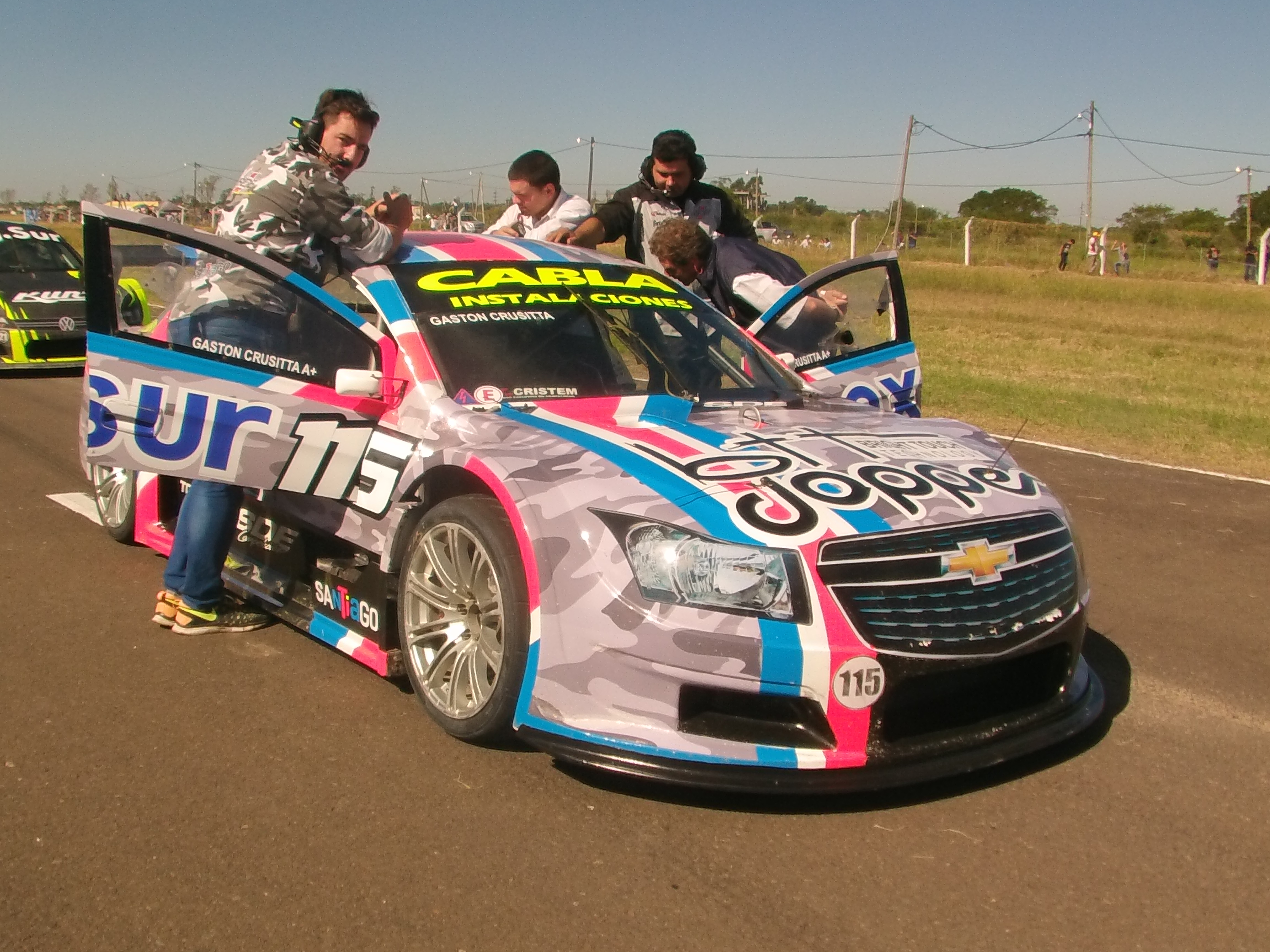 Prototipo Top Race Series identificado con rasgos de diseño del modelo Chevrolet Cruze I